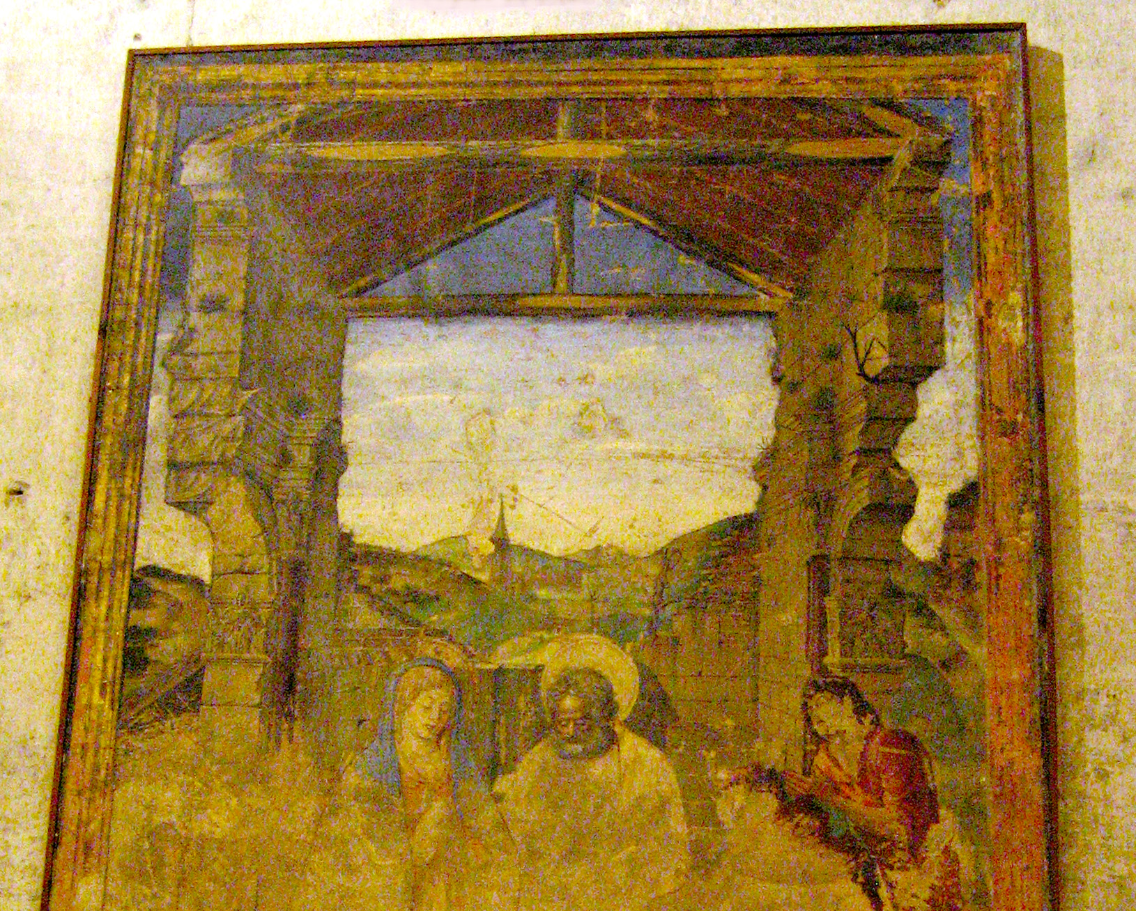 Fresc de Sanleocadio (Seu de València)